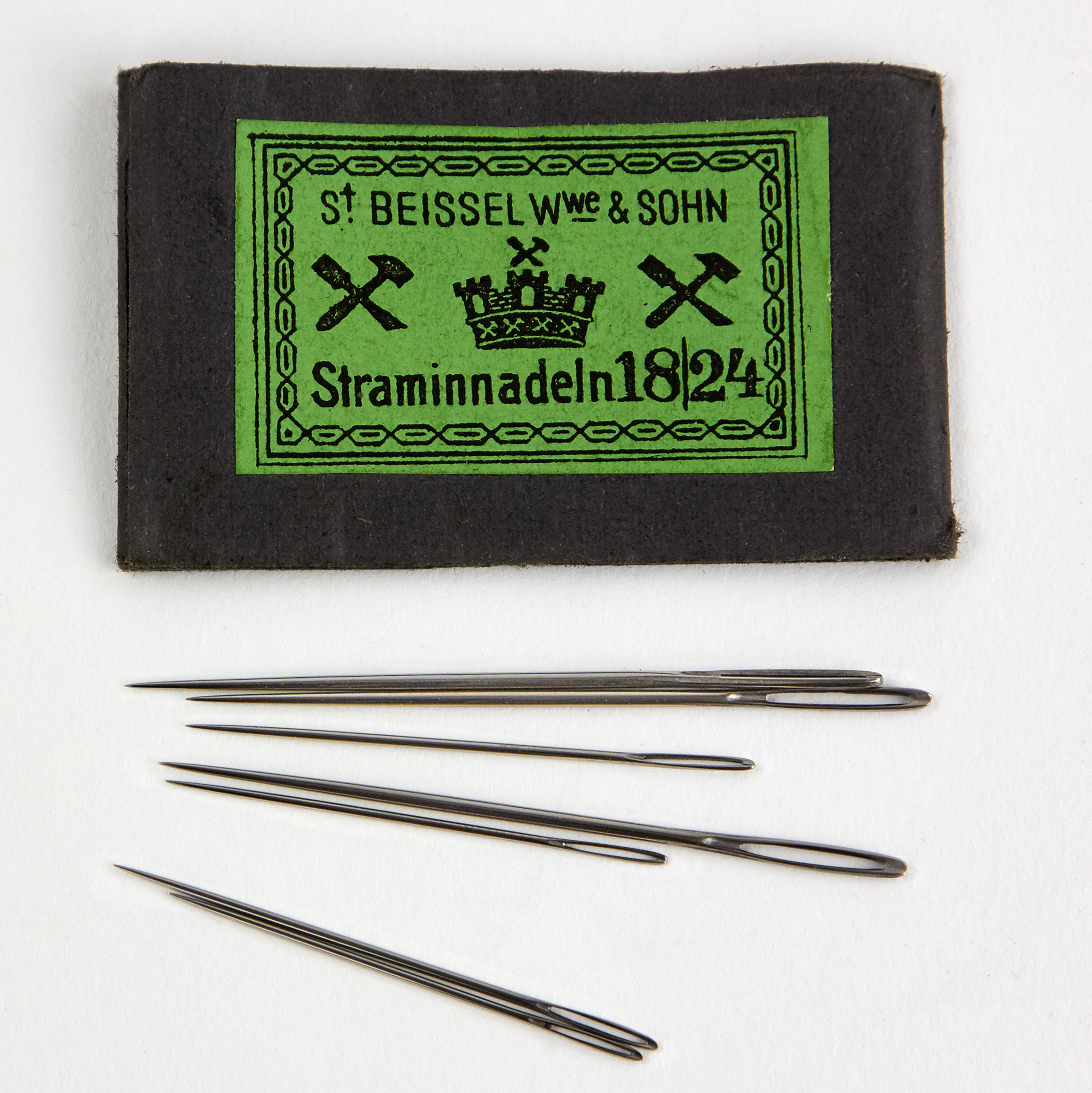 Straminnadeln 18 24